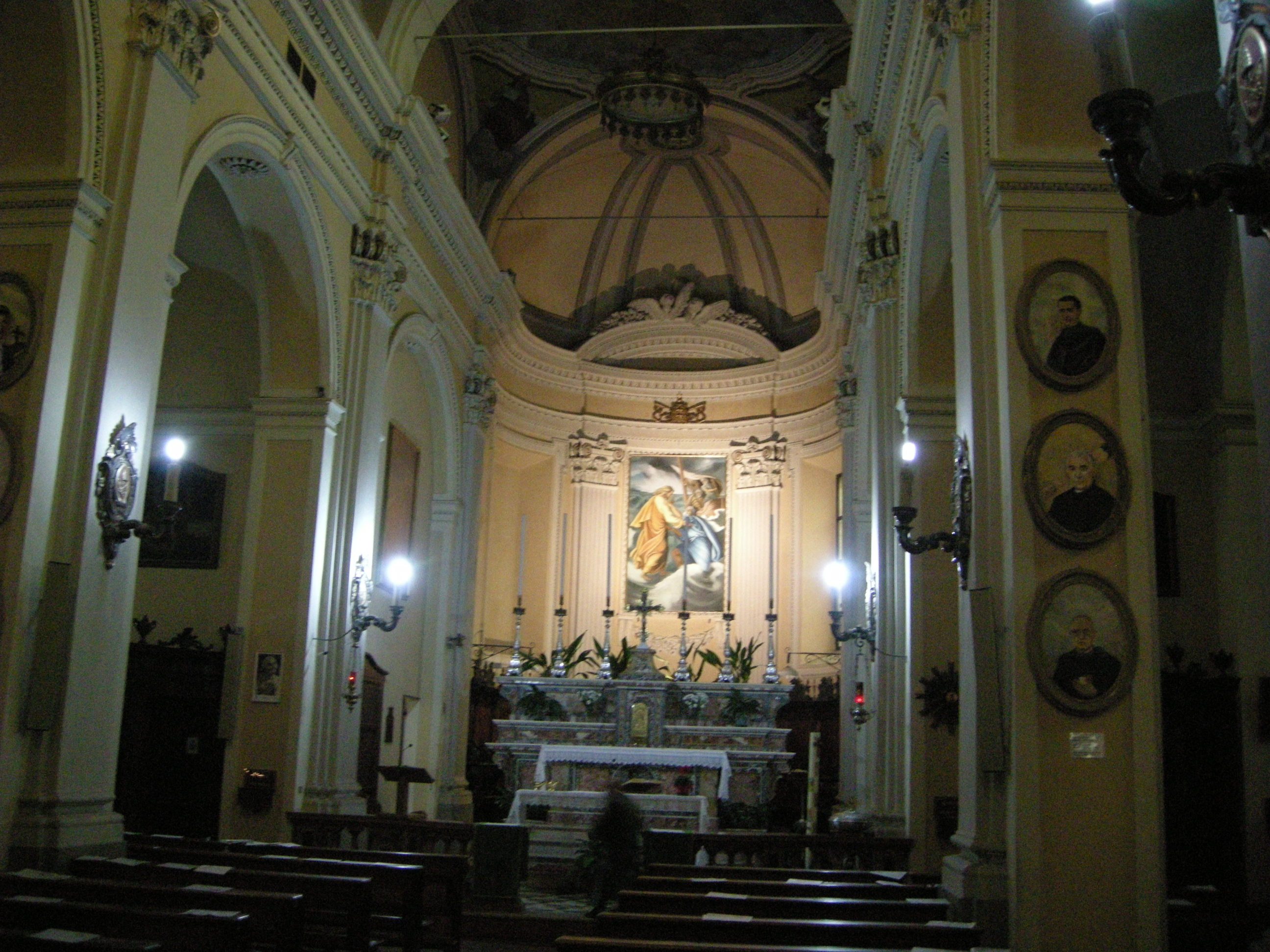 Fidenza, san pietro apostolo